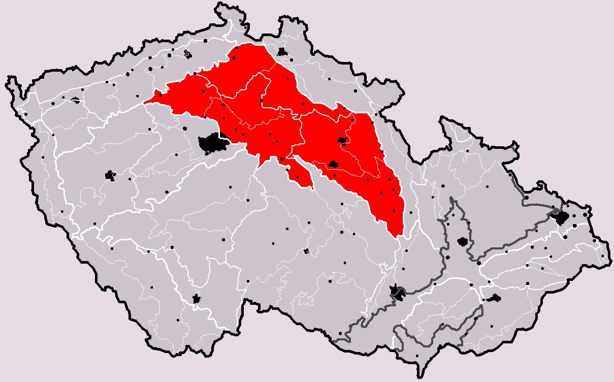 Poloha geomorfologické subprovincie (soustavy) Česká tabule v rámci České republiky. Hercynský systém Hercynská pohoří I Česká vysočina I6 (VI) Česká tabule